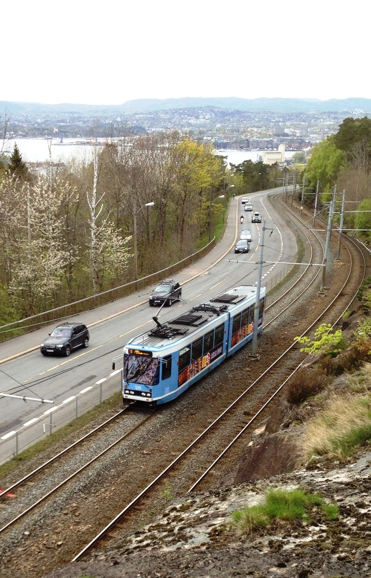 Ekebergbanen og Kongsveien, Ekebergåsen, Oslo